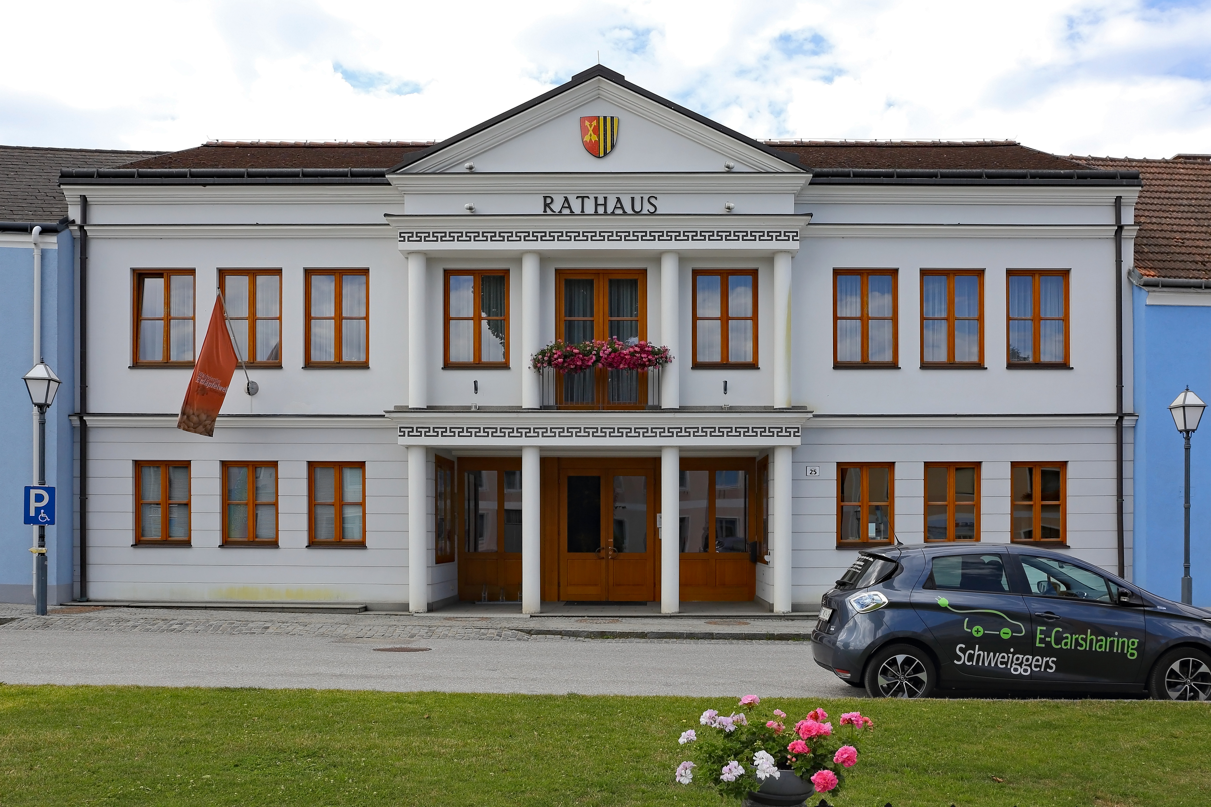 Rathaus in Schweiggers mit dem Erdäpfelmuseum